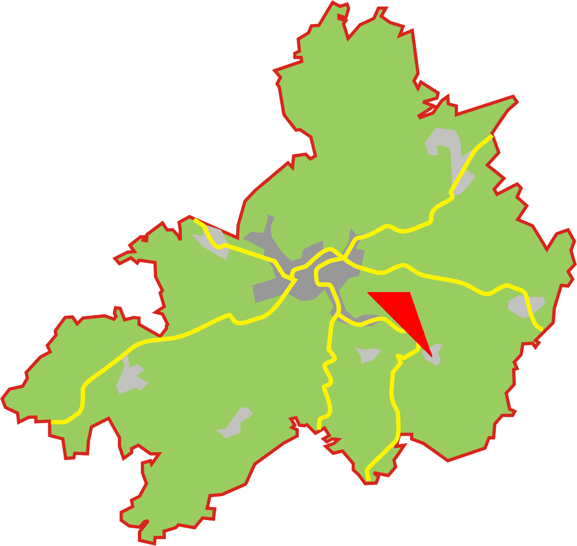 Pos dohrgaul